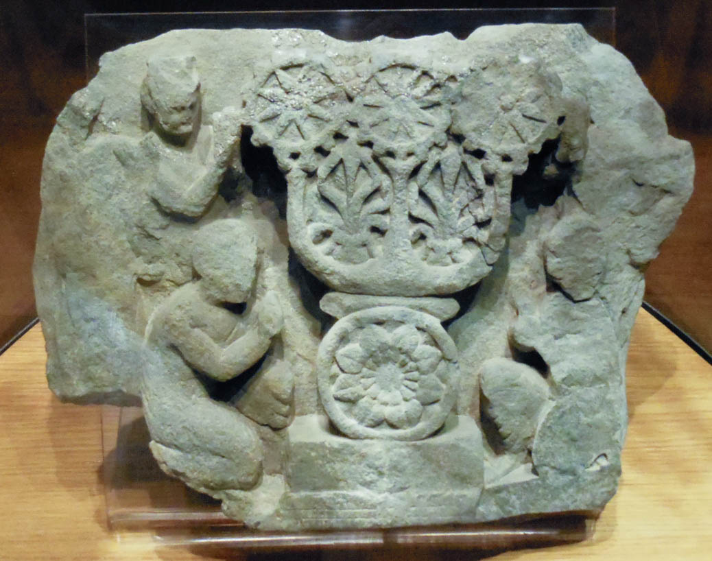 Adorazione del triratna (i tre « gioielli » del Buddhismo, ovvero il Buddha, la Legge, la comunità). Frammento di rilievo, stile « disegnativo », schisto verde, Butkara I, Swat, Pakistan, metà I sec. d.C., MNAO inv. 2137, MAI B 3214, Deposito IsIAO (Archivio MNAO : Laura Giuliano). Roma, Museo nazionale di arte orientale (palazzo Brancaccio).